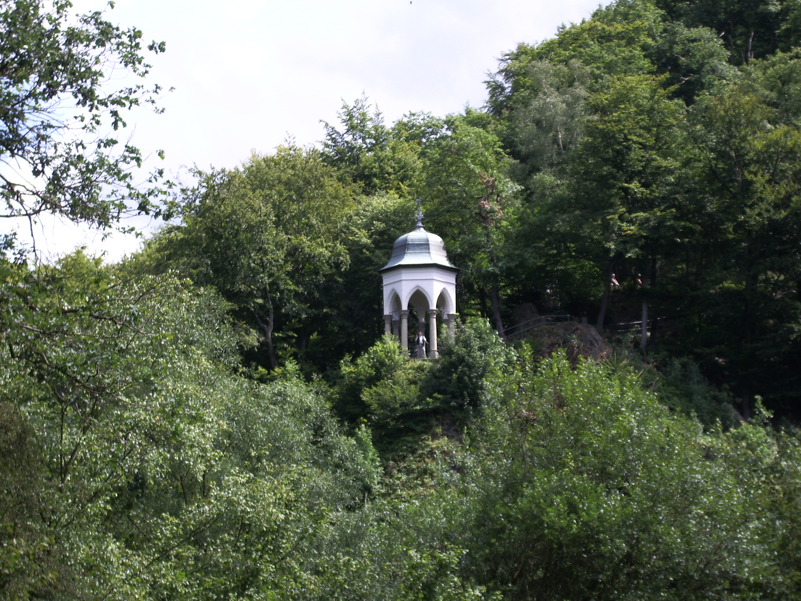 Diederichstempel an der Müngstener Brücke